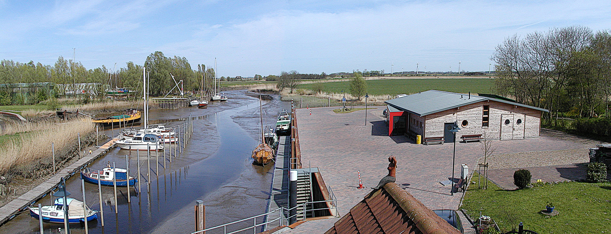 Der kleine Hafen von Neuhaus (Oste)